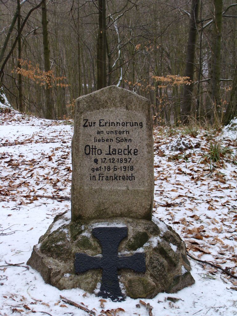 Cmentarz rodziny Jaeckel w Uroczysku Szwedzki Młyn w Puszczy Bukowej pod Szczecinem